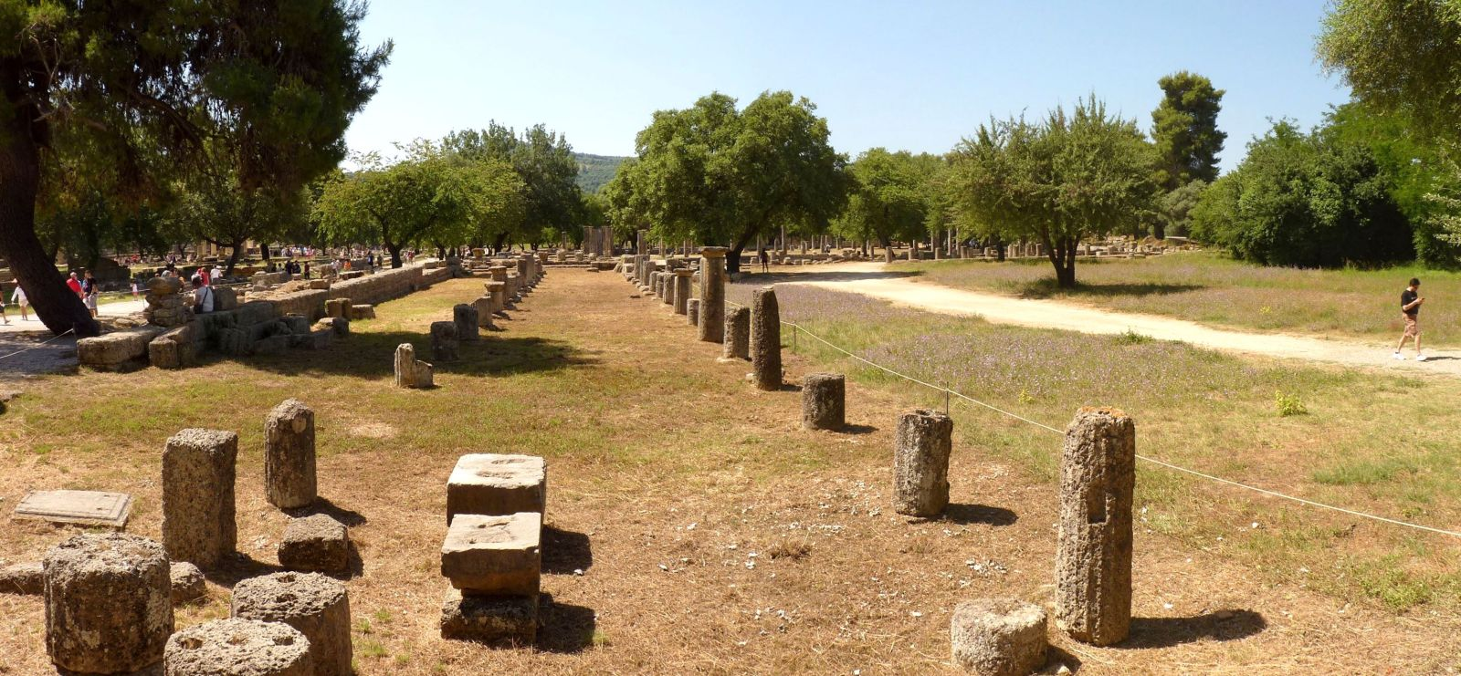 Olympia (Greek: Ολυμπία Olympía), a sanctuary of ancient Greece in Elis, is known for having been the site of the Olympic Games in classical times, the most famous games in history. You can use the images for free. But a link to - I would be happy :)